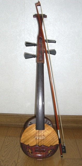 조선민주주의인민공화국의 4현 현악기. 중국의 얼후나 해금에 기초하여 제작됨.